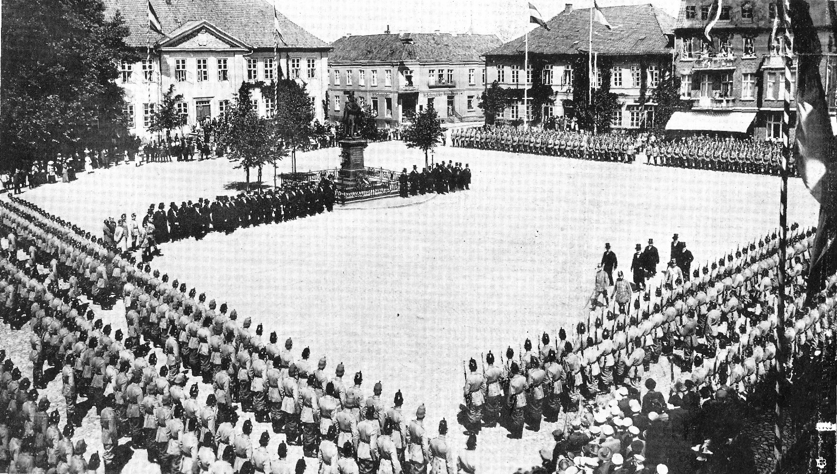 50-jähriges Bestehen des Lauenburgischen Jäger-Bataillons in Ratzeburg. Der Kommandeur schreitet mit den Spitzen der Behörden die Front ab.